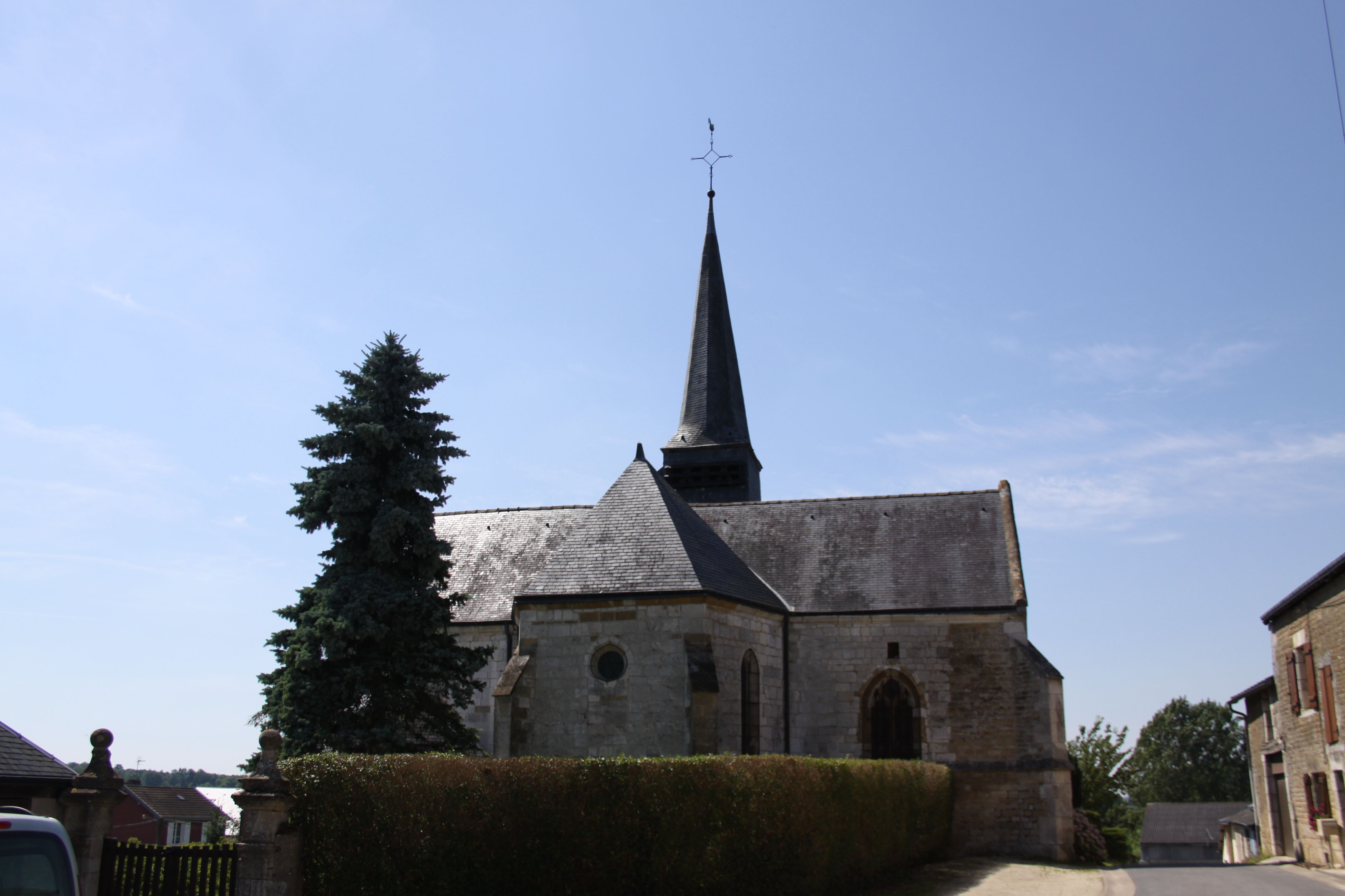 Église Saint-Martin de Raillicourt (Ardennes, France) .